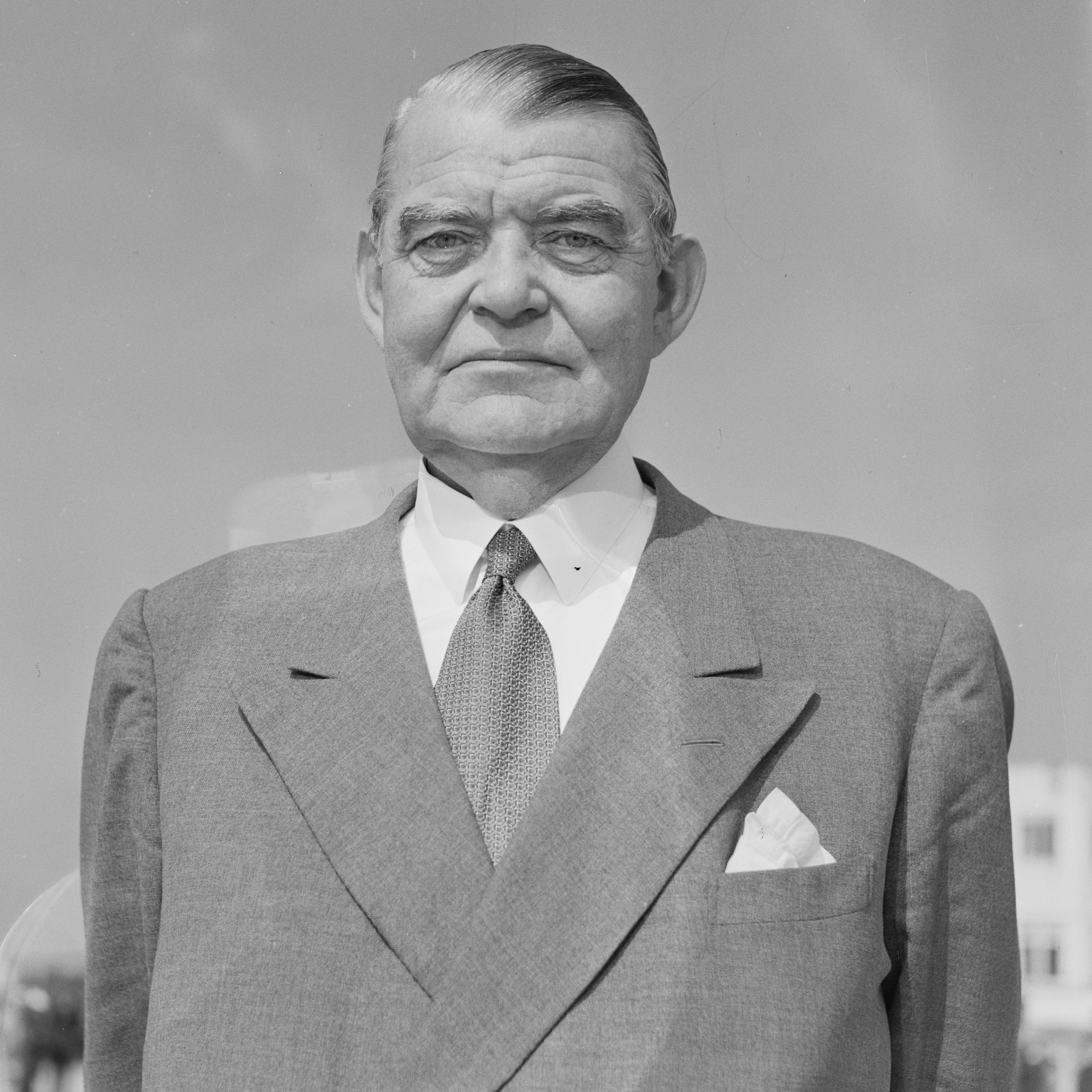 Bildet er hentet fra Arkivverket. Polflyvning, SAS-fly med mannskaper til Korea. NÅ nr. 13, 1953. Arkivinstitusjon : Riksarkivet Arkivnavn : Billedbladet NÅ Sted : Norge, Akershus, Ullensaker, Gardermoen Emneord: Menn, Portretter Avbildet: Riiser-Larsen, Hjalmar